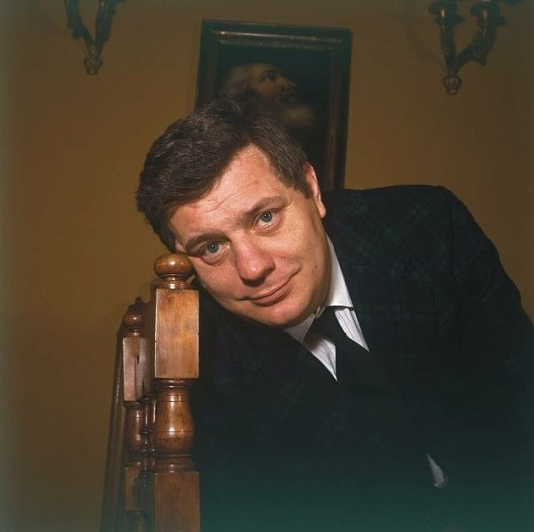 Immagine dell'attore italiano Renzo Palmer messa a disposizione dalla figlia, Giulia Palmer.